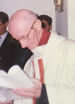 Don Cirillo Perron nella Chiesetta di Planpincieux nel 1989